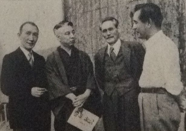 『風雪二十年』撮影風景。左から、青山杉作（金森徳次郎役）、千田是也（望月圭介役）、薄田研二（美濃部達吉役）、佐分利信監督。